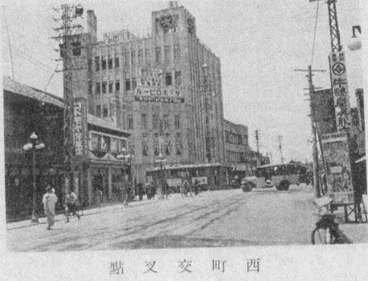 戦前の堀川通り方面より望む富山市西町交叉点。中央のビルは宮市大丸富山店（後の大和富山店）。